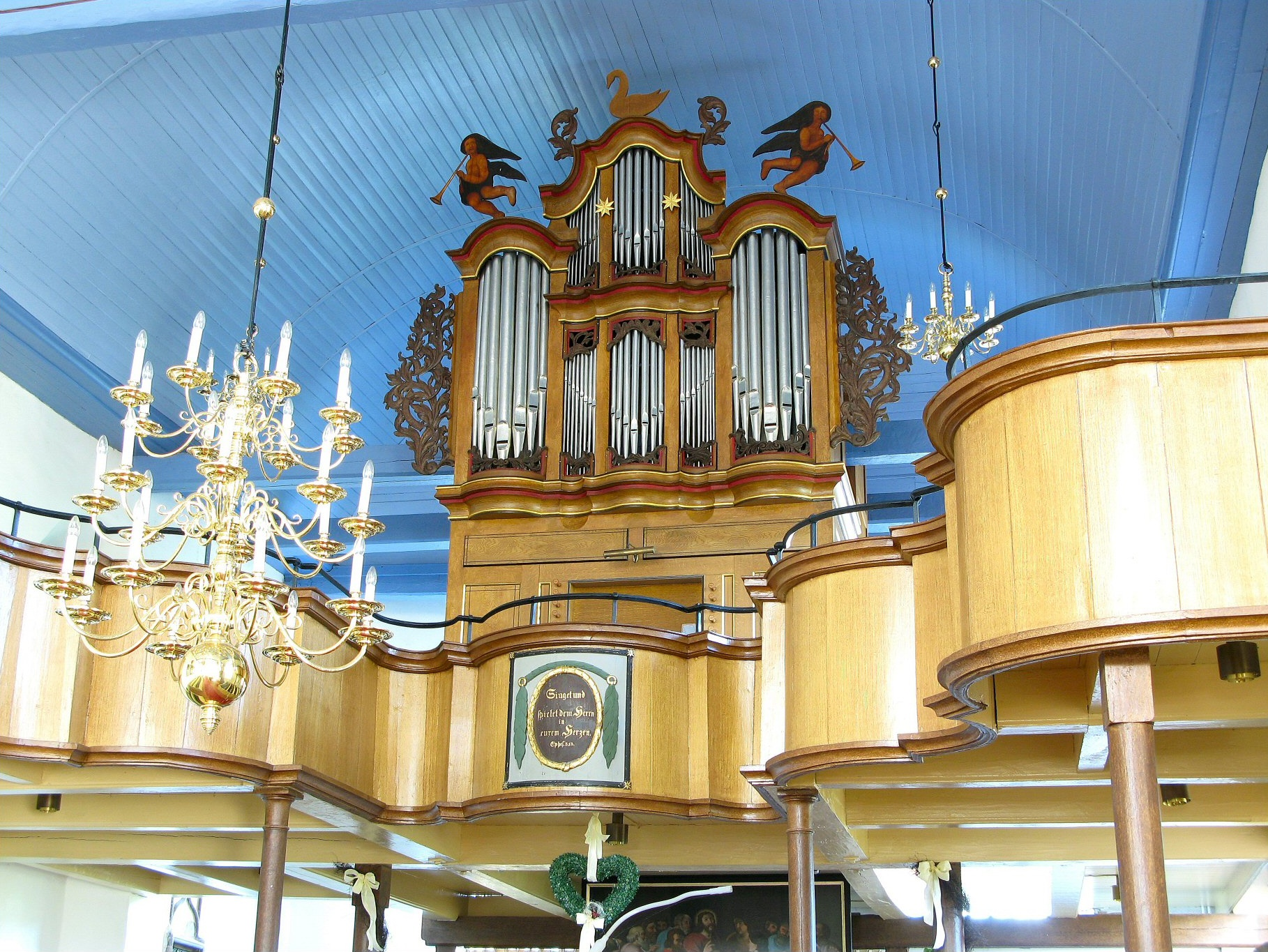 Orgel in Riepe, Landkreis Aurich